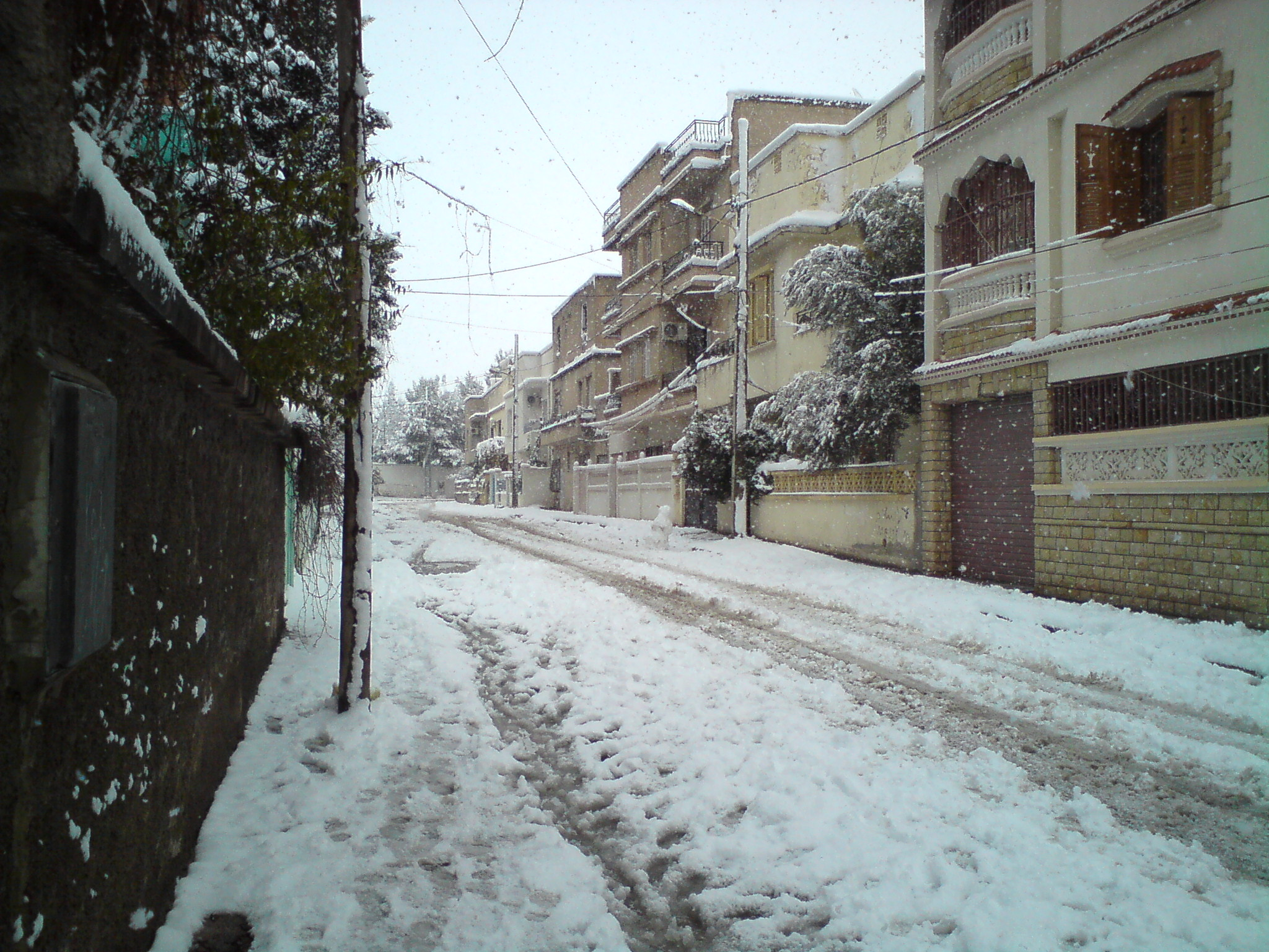 Chelghoum Laïd sous la neige (2012)